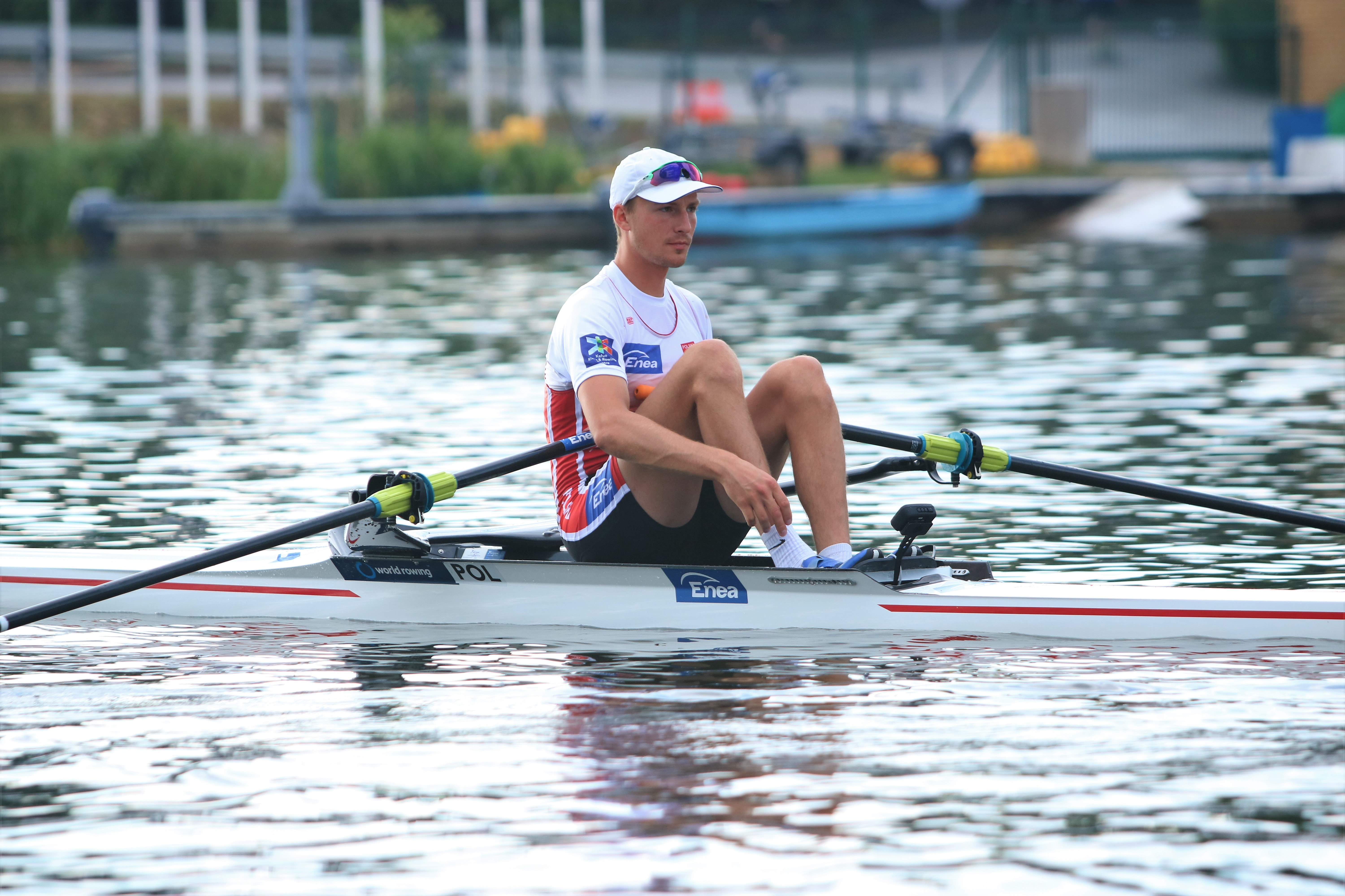 Puchar Świata II Poznań 2019 - 1xMA Natan Węgrzycki-Szymczyk (PL)